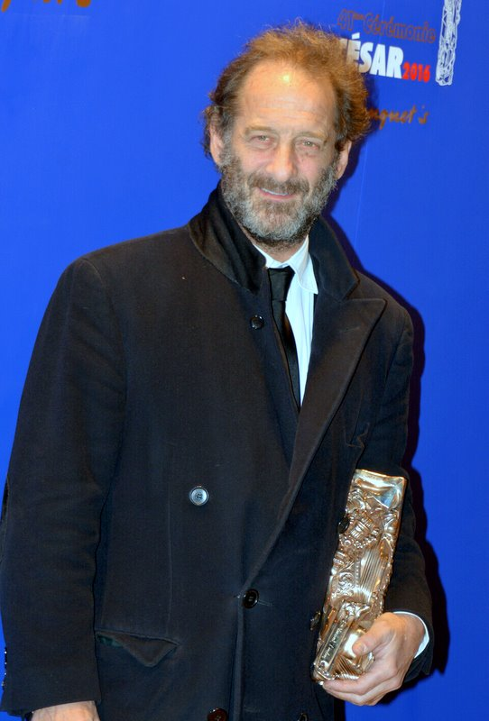 Vincent Lindon à la cérémonie des César